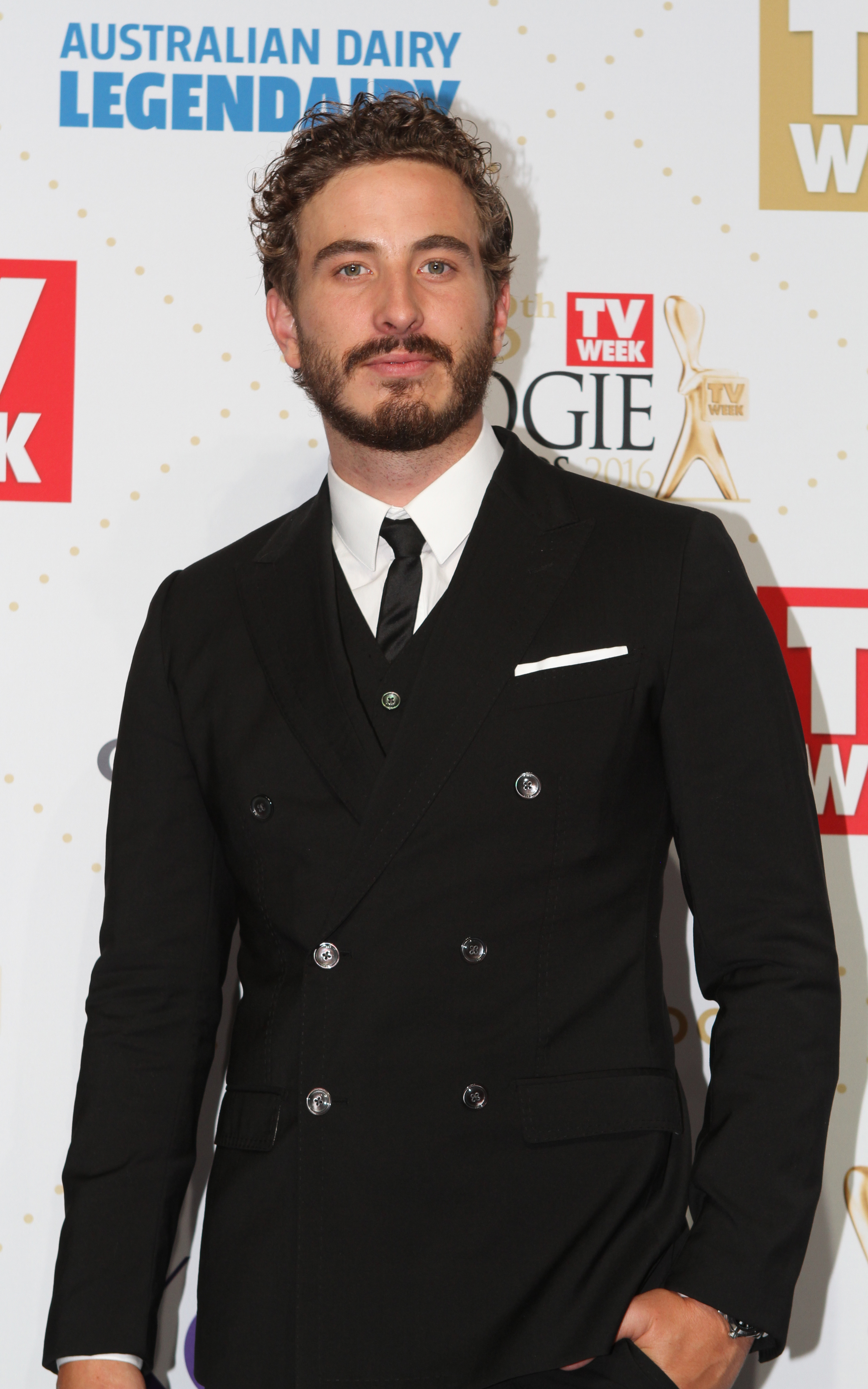 Ryan Corr 2016 TV Week Logie Awards